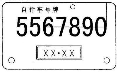 号码分离式自行车号牌式样